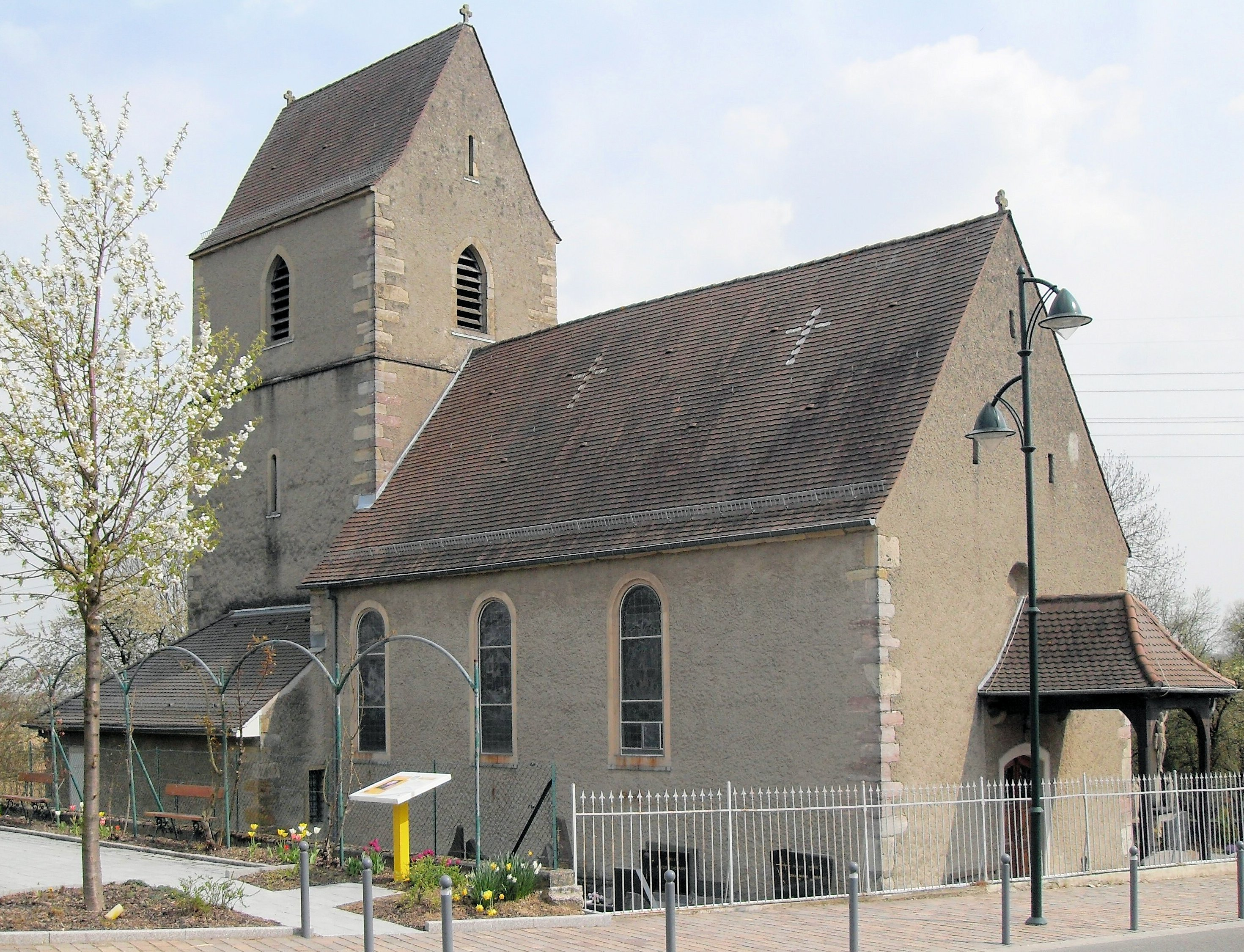 L'église Saint-Pierre et Saint-Paul à Stetten